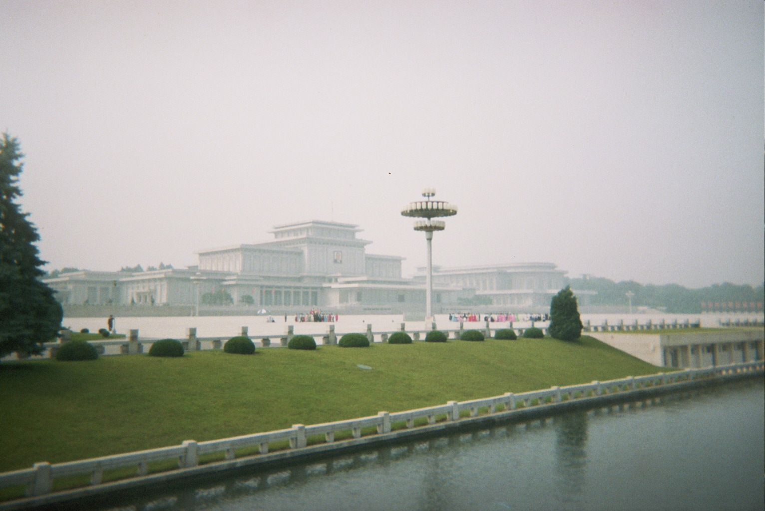 Kim Il Sung maosoleum